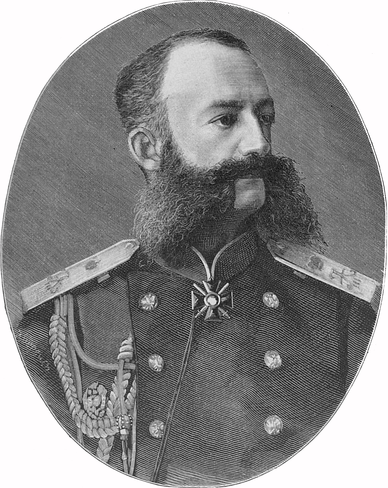 Безак Николай Александрович, начальник Главного управления почт и телеграфов Российской империи